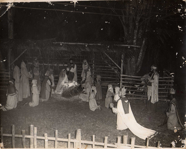 Representación del Nacimiento de Jesús por pobladores del Batey del Central Mañalich alla por el 1960 cuyo finalidad era recaudar fondos destinados a niños y personas minusvalidas.